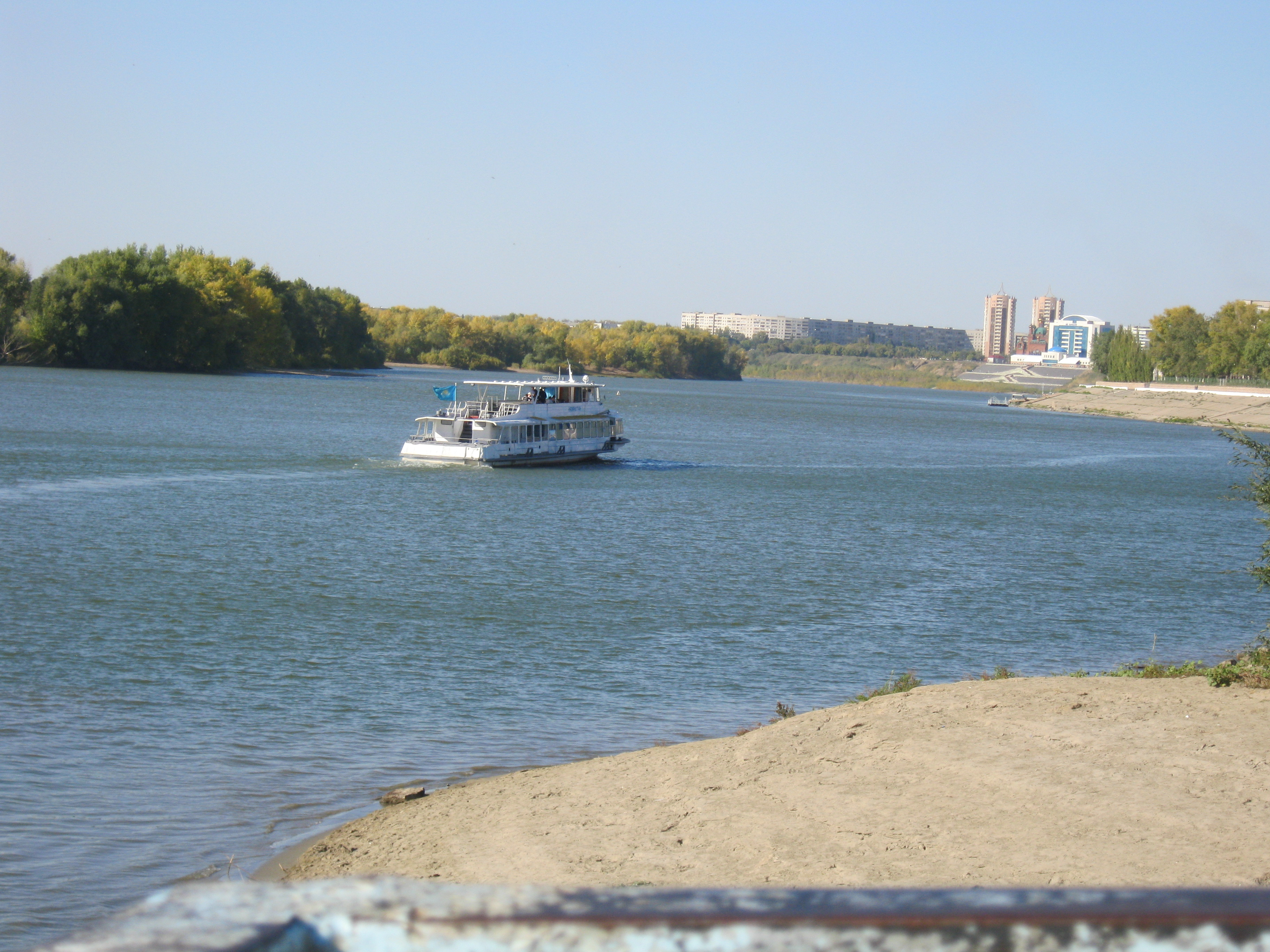 Иртыш (Irtysh)